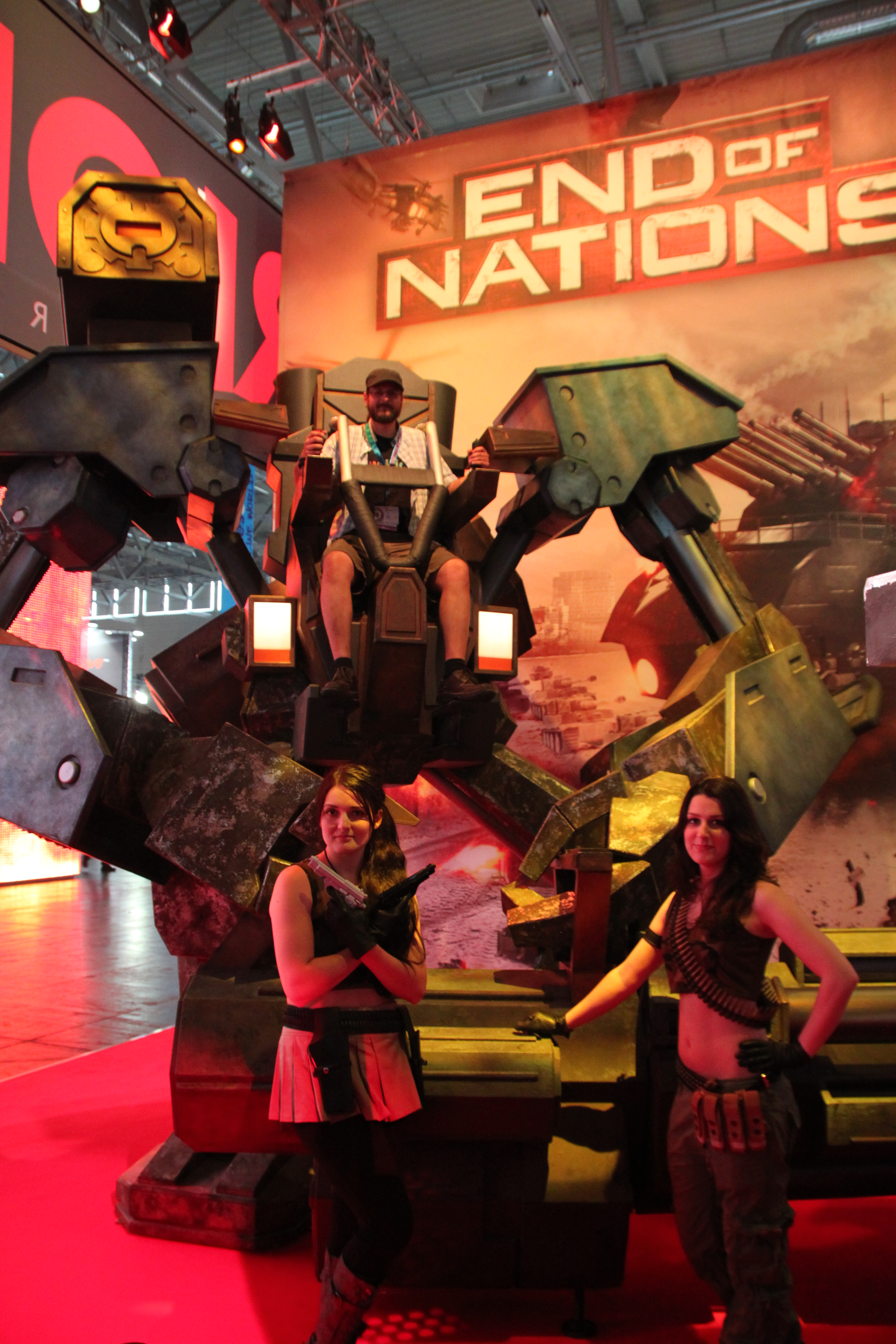 Micha auf dem End of Nations Mech 1/2